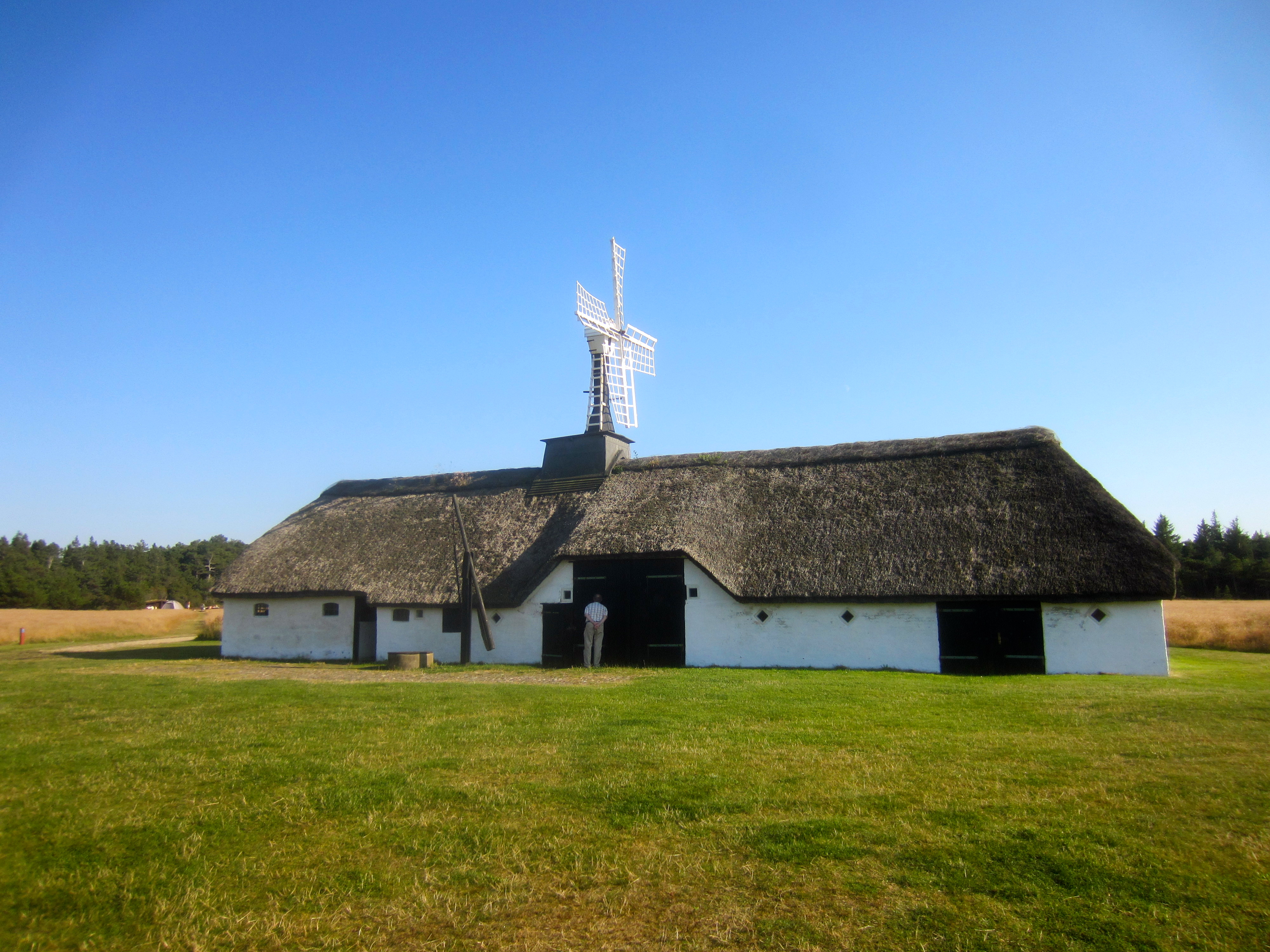 Holkkvarn, Østerklit Stokmølle vid Tversted Plantage, Tannis Bugt på Nordjylland.